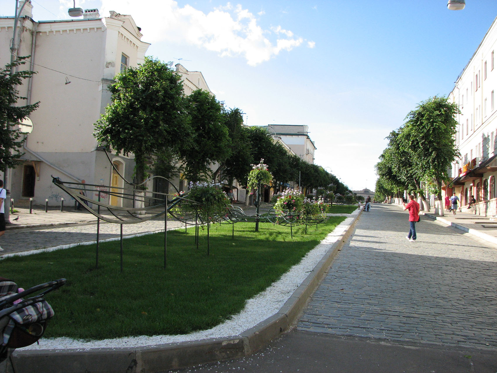 г. Орёл